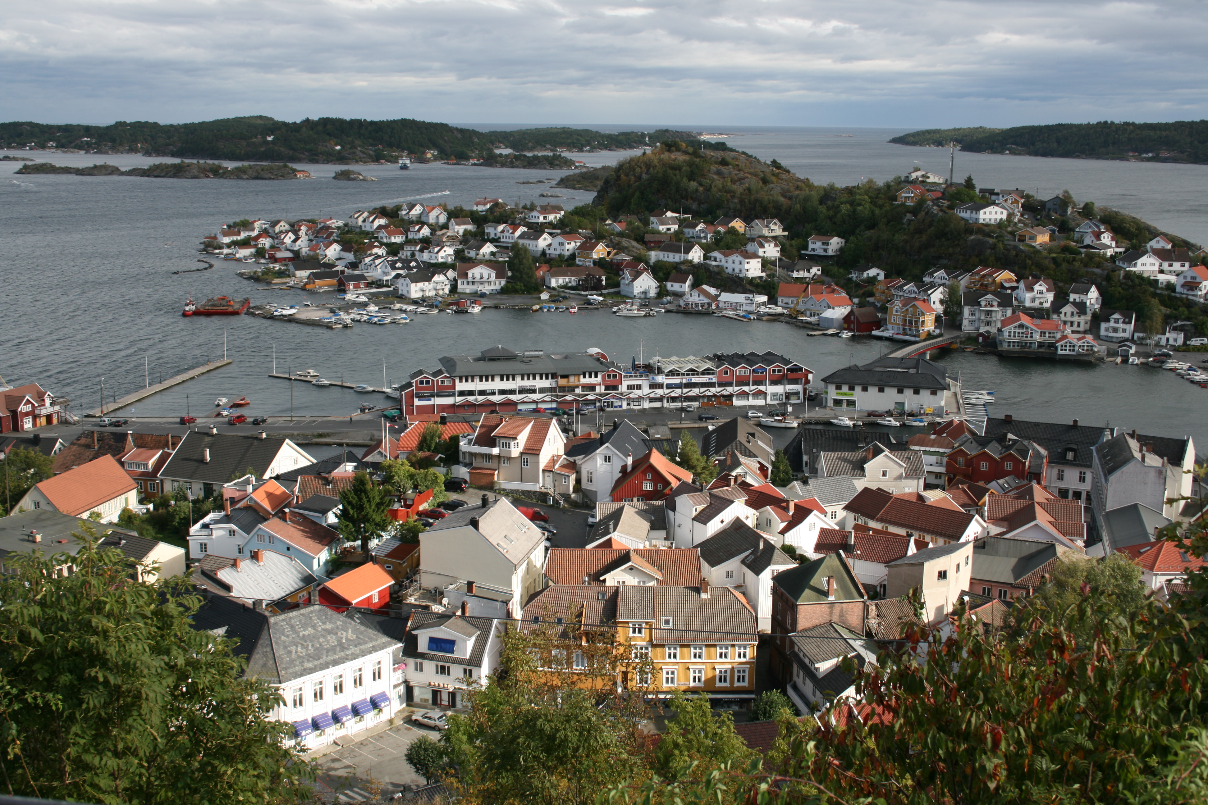 Kragerø